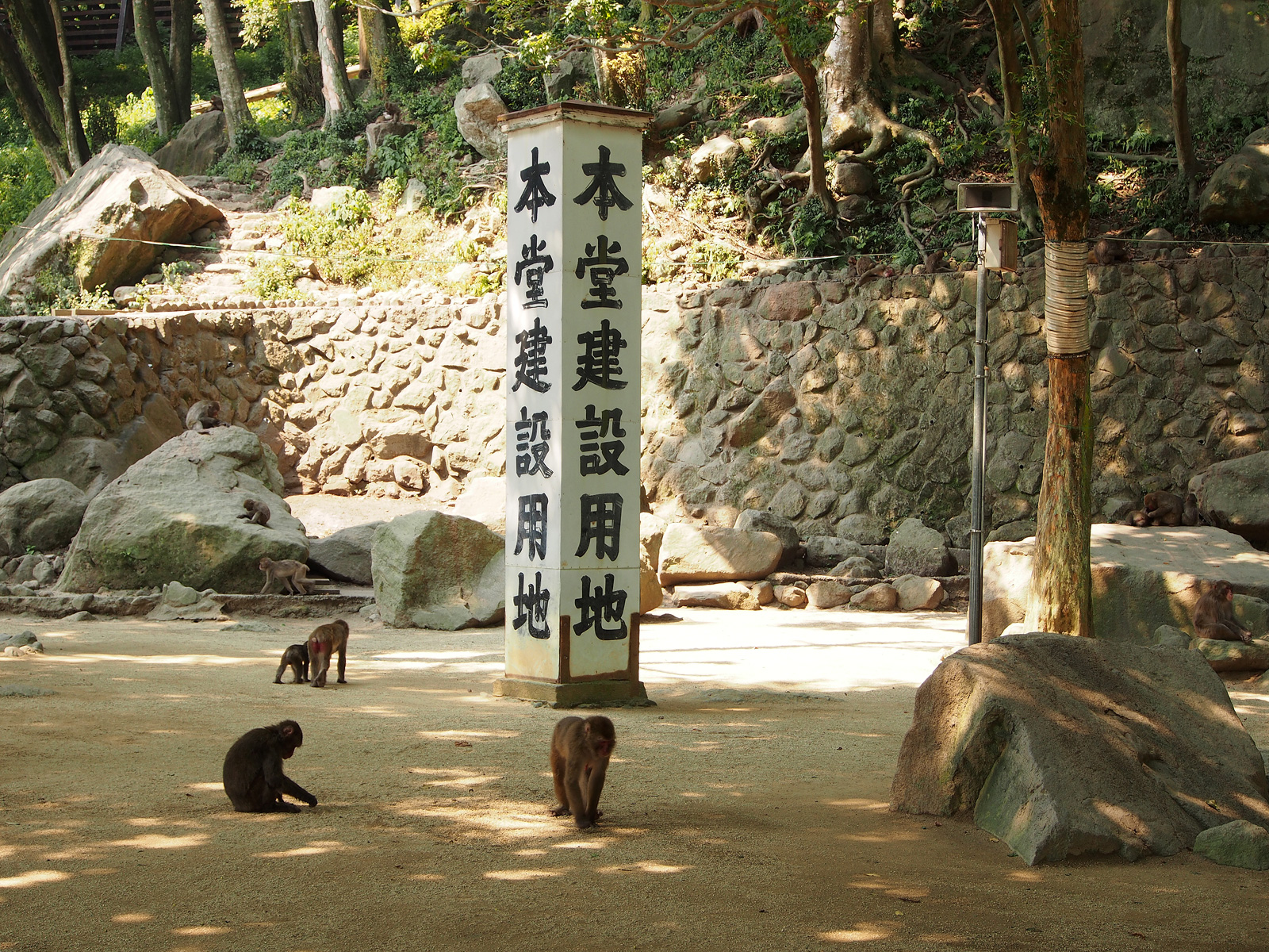 高崎山自然動物園（大分県大分市）にある万寿寺本堂建設用地の看板